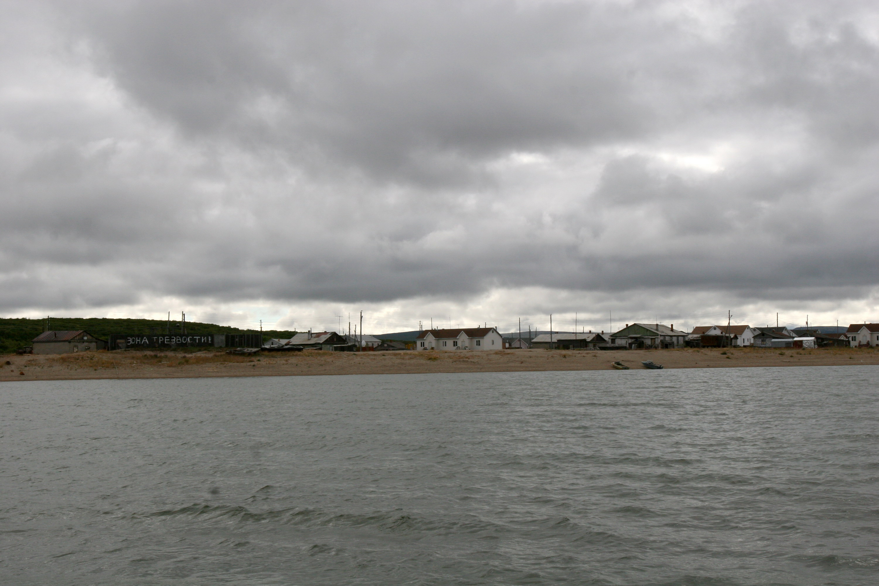 Cело Краснено